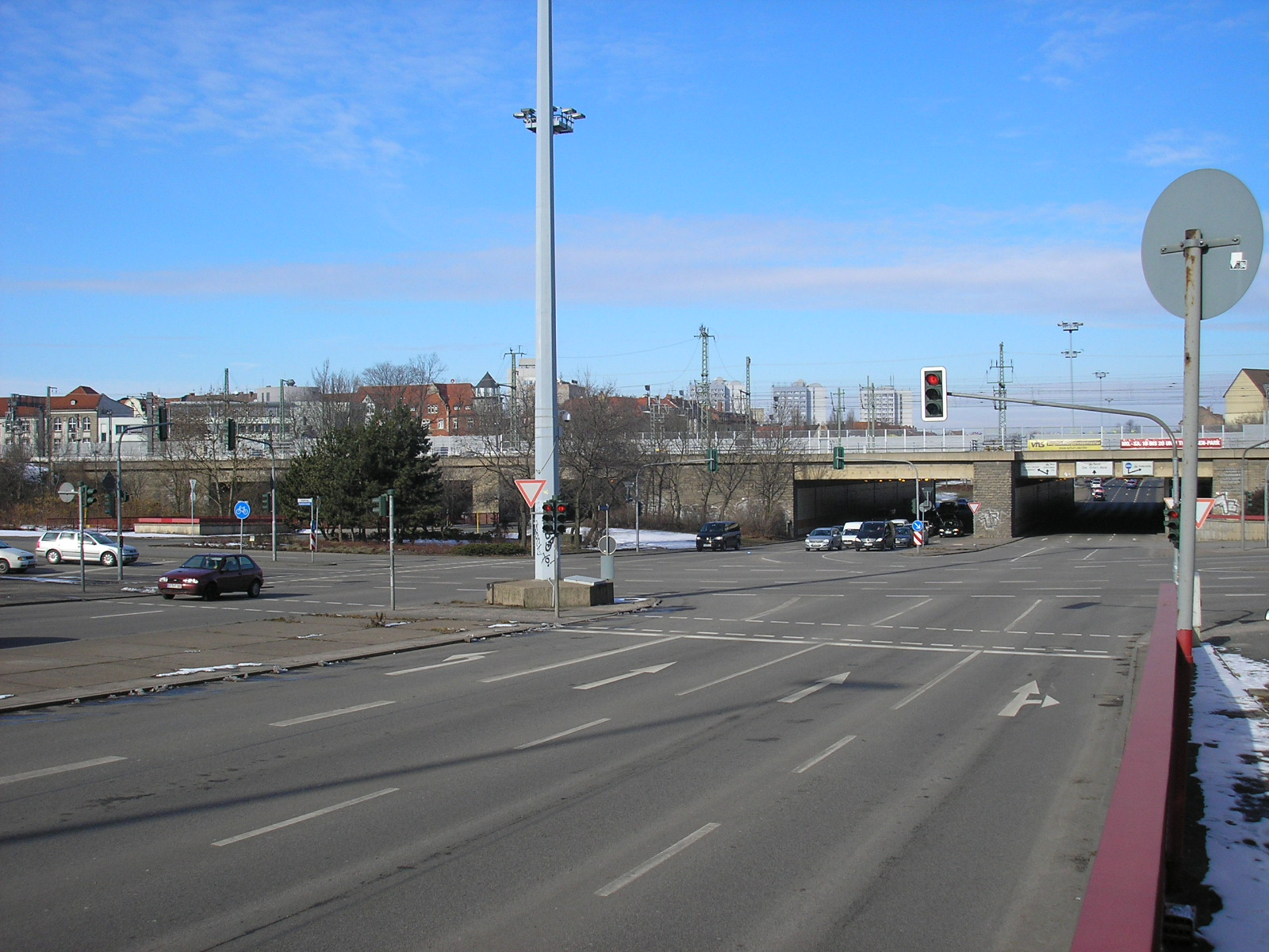 Das südliche Kreuz des Schmidtstedter Knotens in Erfurt (Thüringen).